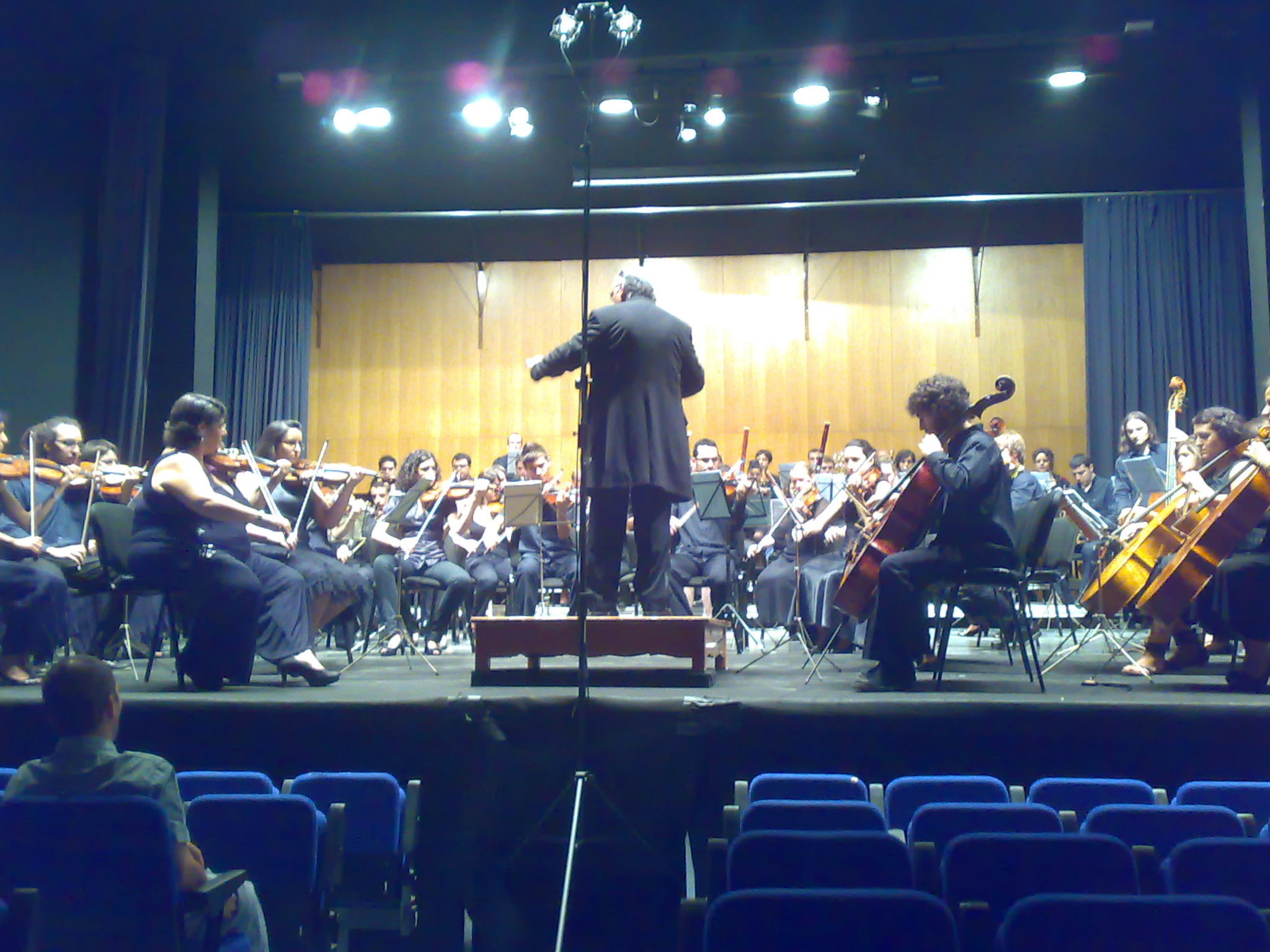 El director barcelonés Jordi Mora dirigiendo en el Teatro Capitolio (Godella, Comunidad Valenciana, España) la Orquestra Simfònica Segle XXI) en 2010